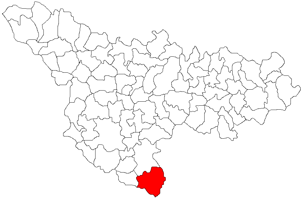 Jamu Mare, Timis Licensing Categorie:Hărţi ale judeţului Timiş